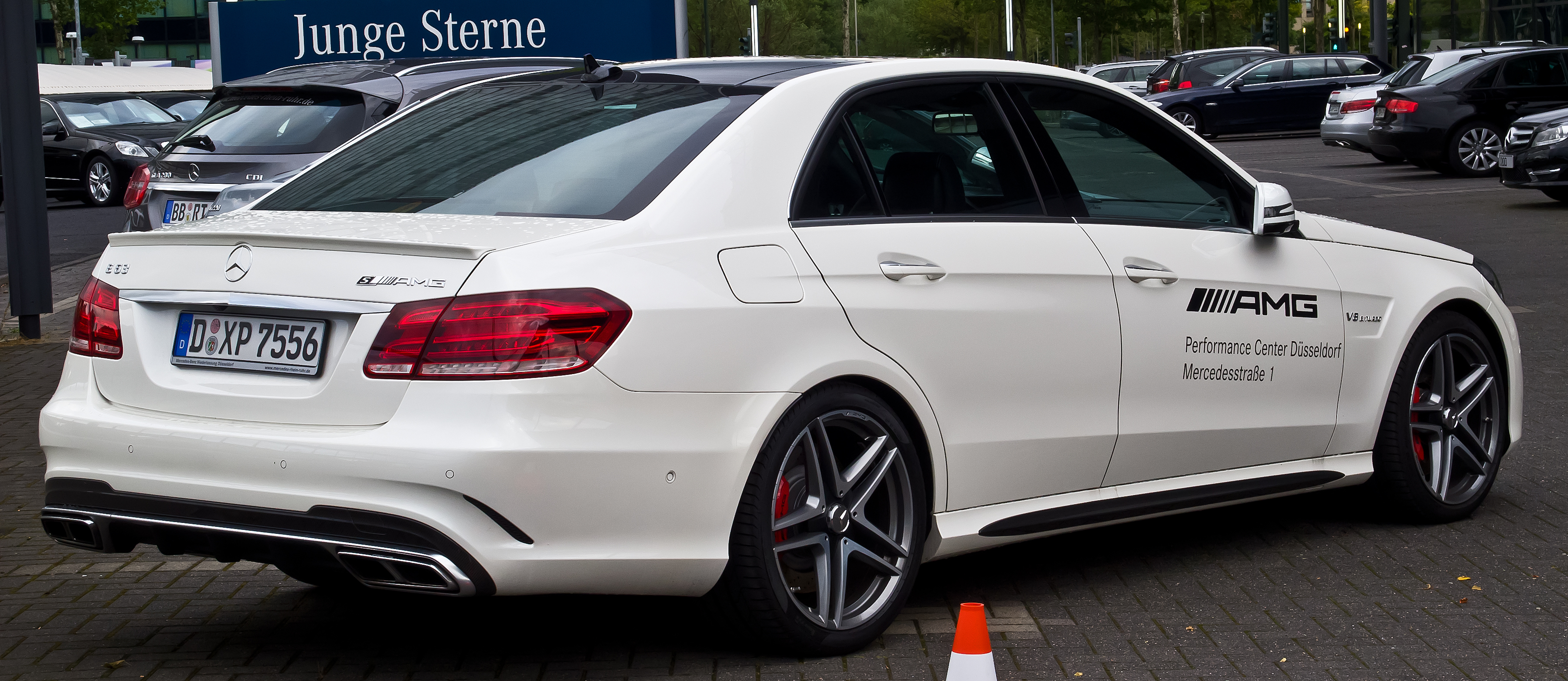 Mercedes-Benz E 63 AMG S 4MATIC (W 212, Facelift)